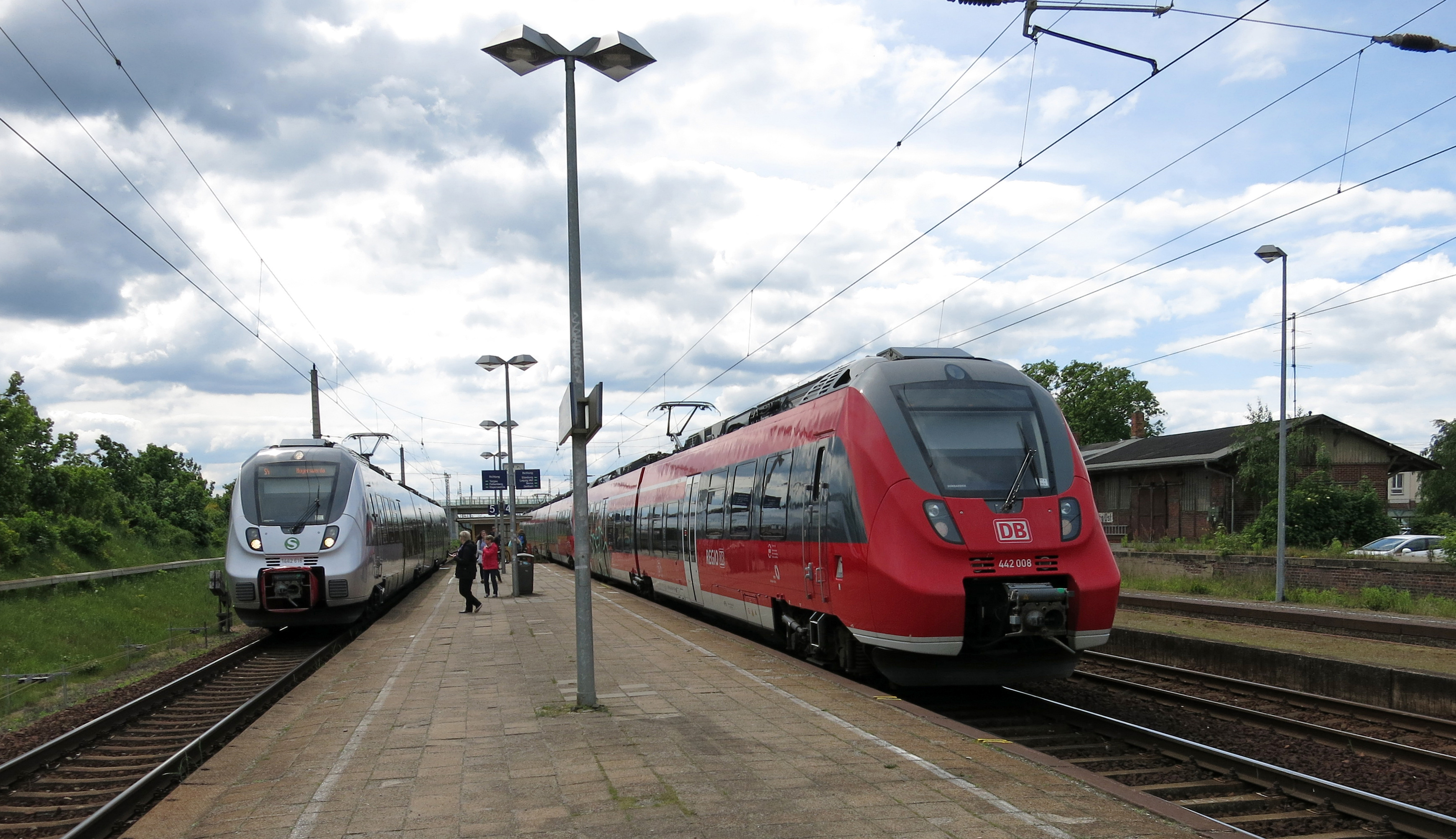 Begegnung S4 und RE10 am Haltepunkt Eilenburg Ost, Triebwagen BR 442.